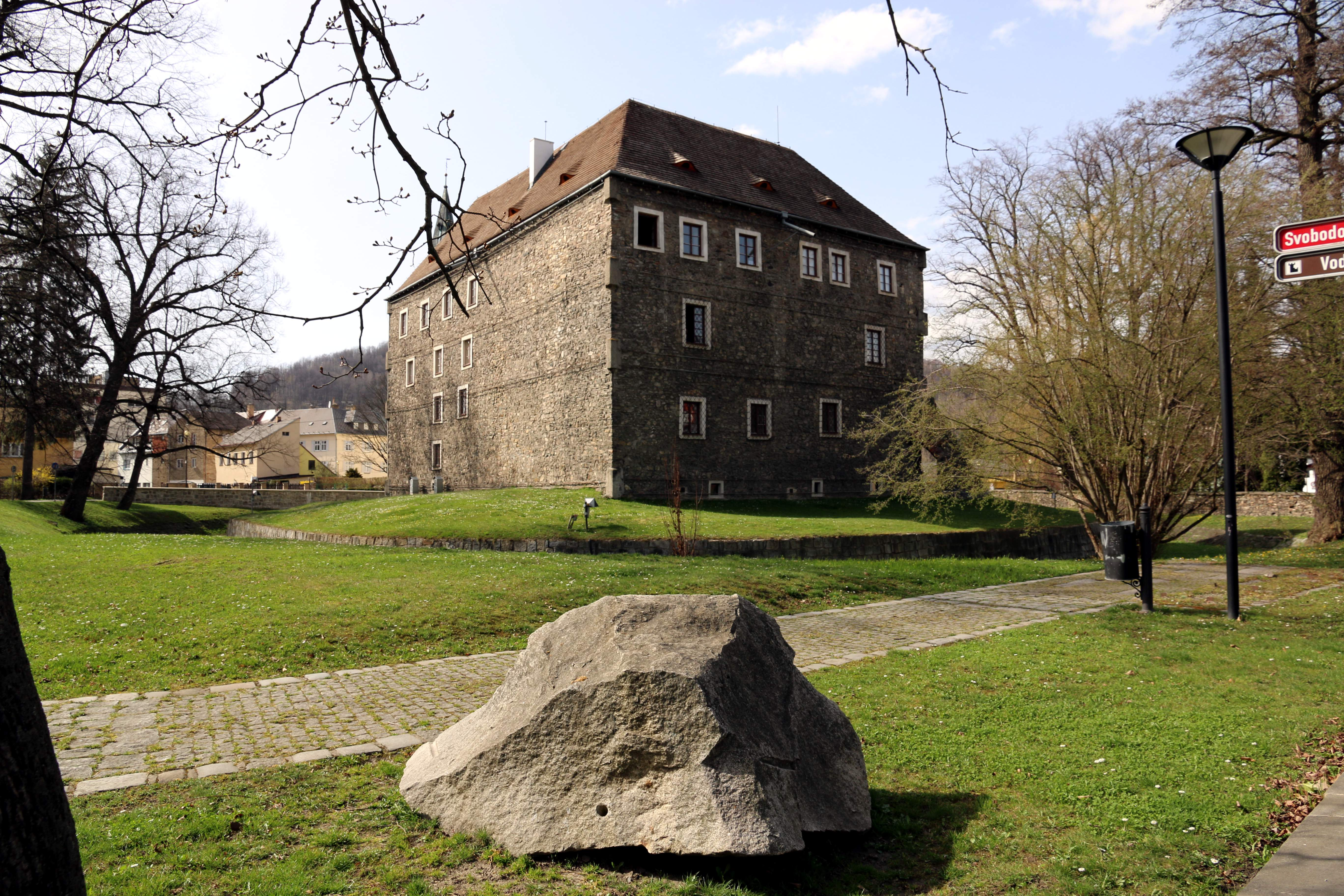 Water Tower in Jeseník (Czech Republic)